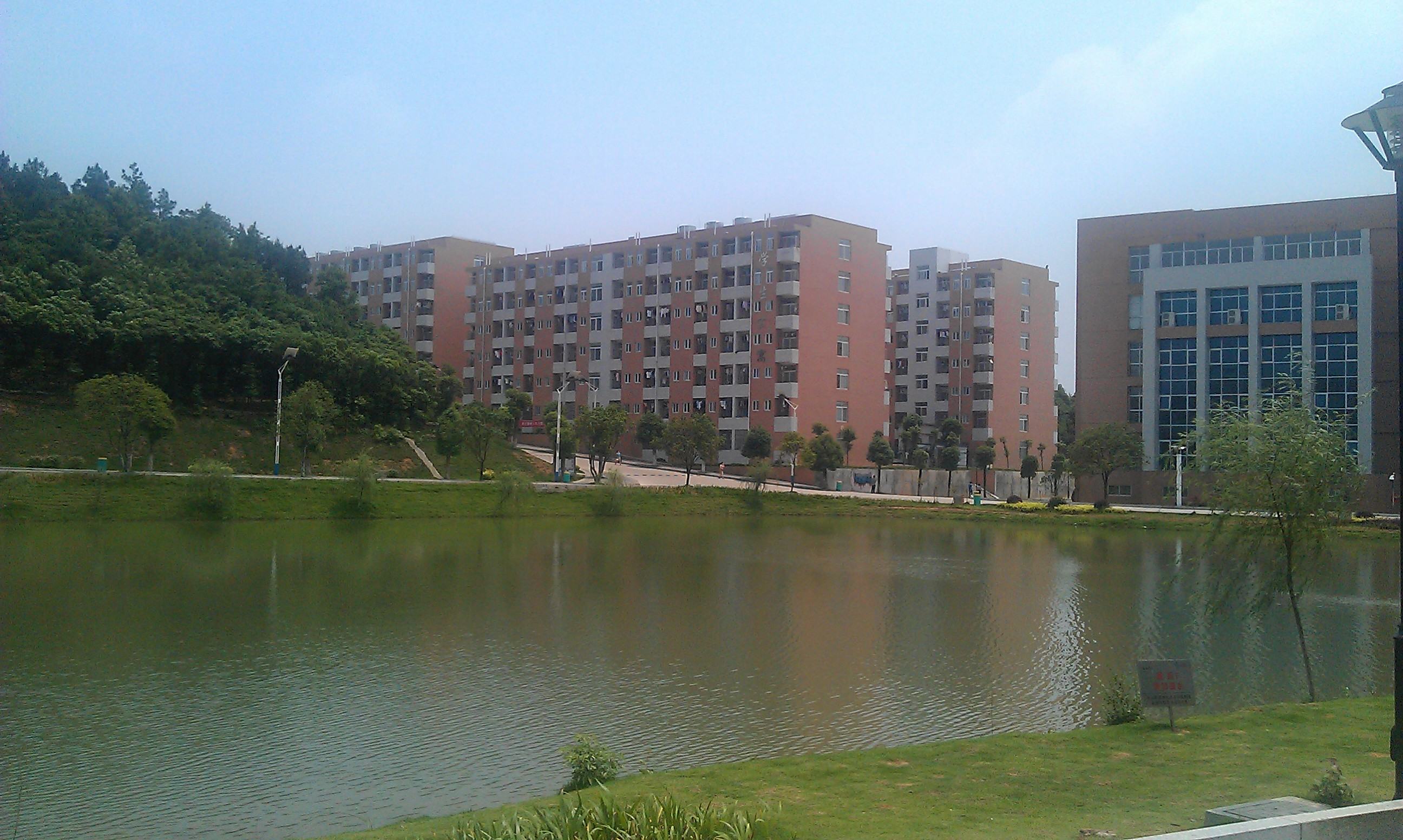 中南林业科技大学望城区校区的宿舍楼。